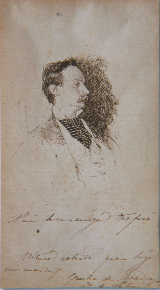 Retrat de Josep Tapiró i Baró a Tànger.